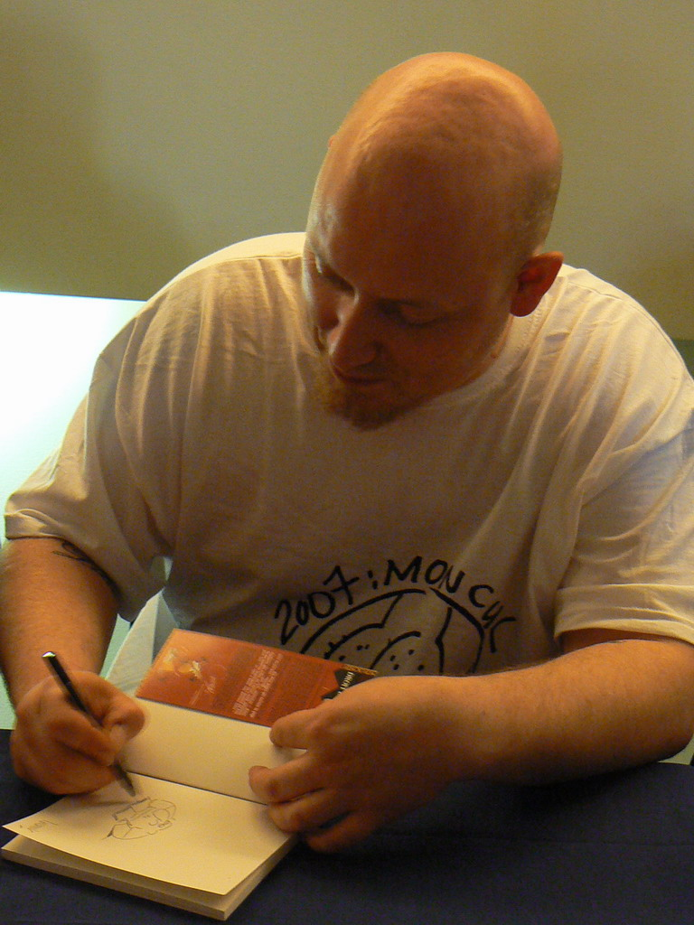 Manu Larcenet en dédicace à Nancy (avril 2007)